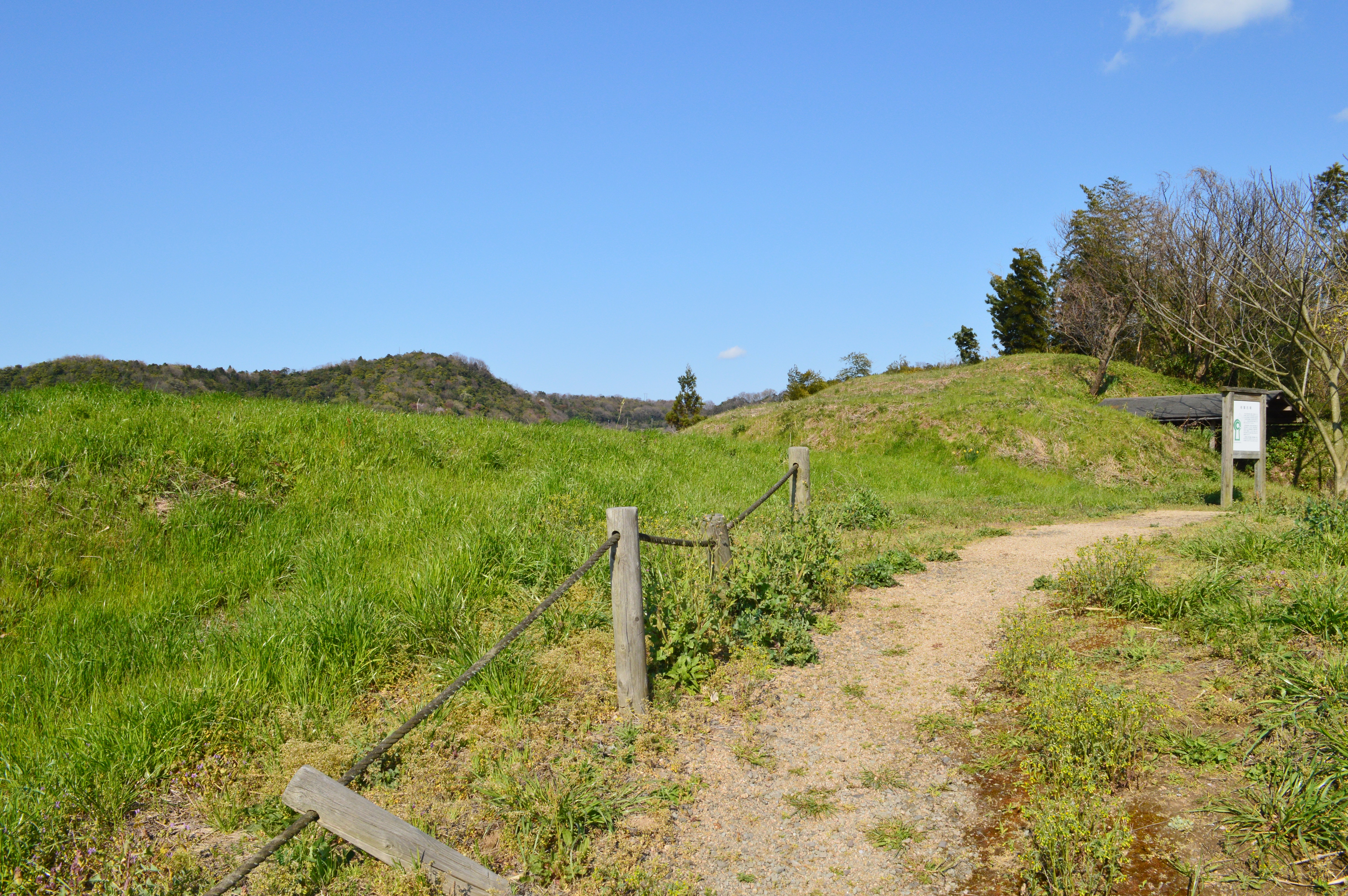 岩屋古墳 (米子市) 墳丘 Nikon D3200